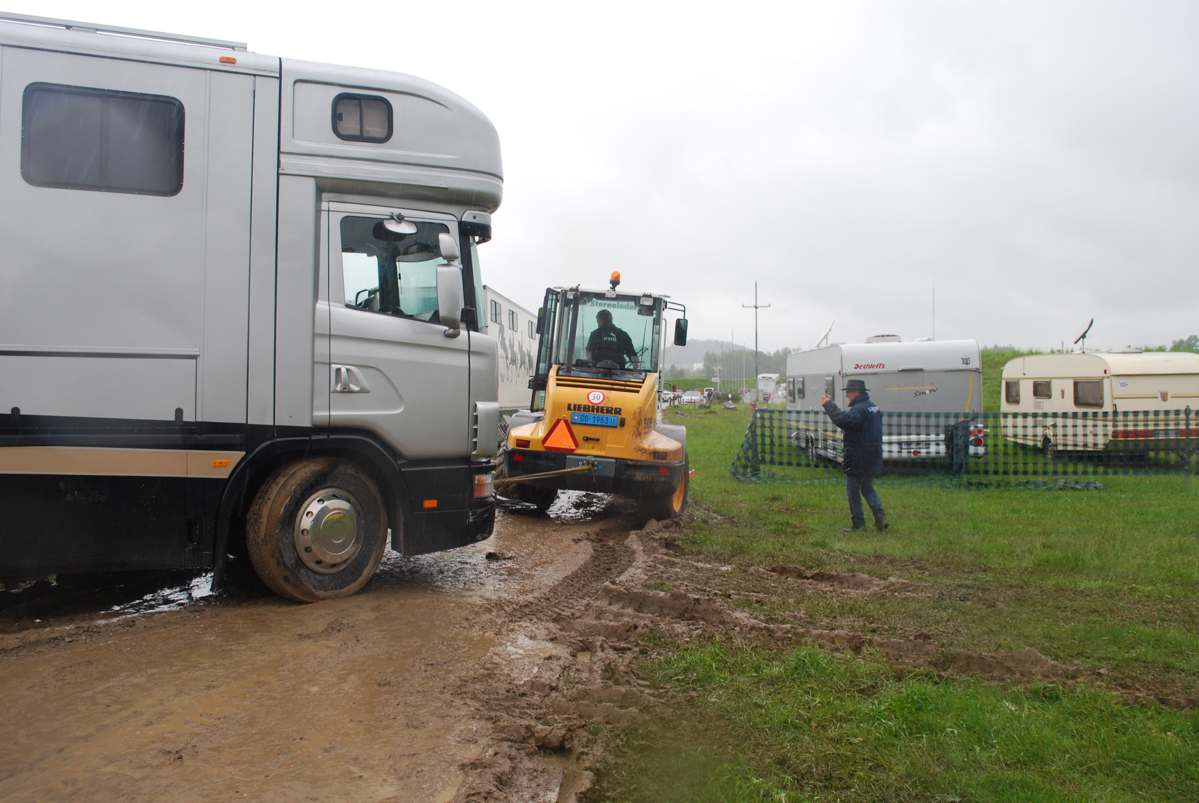 Nachdem der CSIO St. Gallen 2013 wegen des schlechten Wetters abgebrochen werden musste, werden die Pferdetransporter der Teilnehmer mit Traktoren aus der Wiese gezogen.